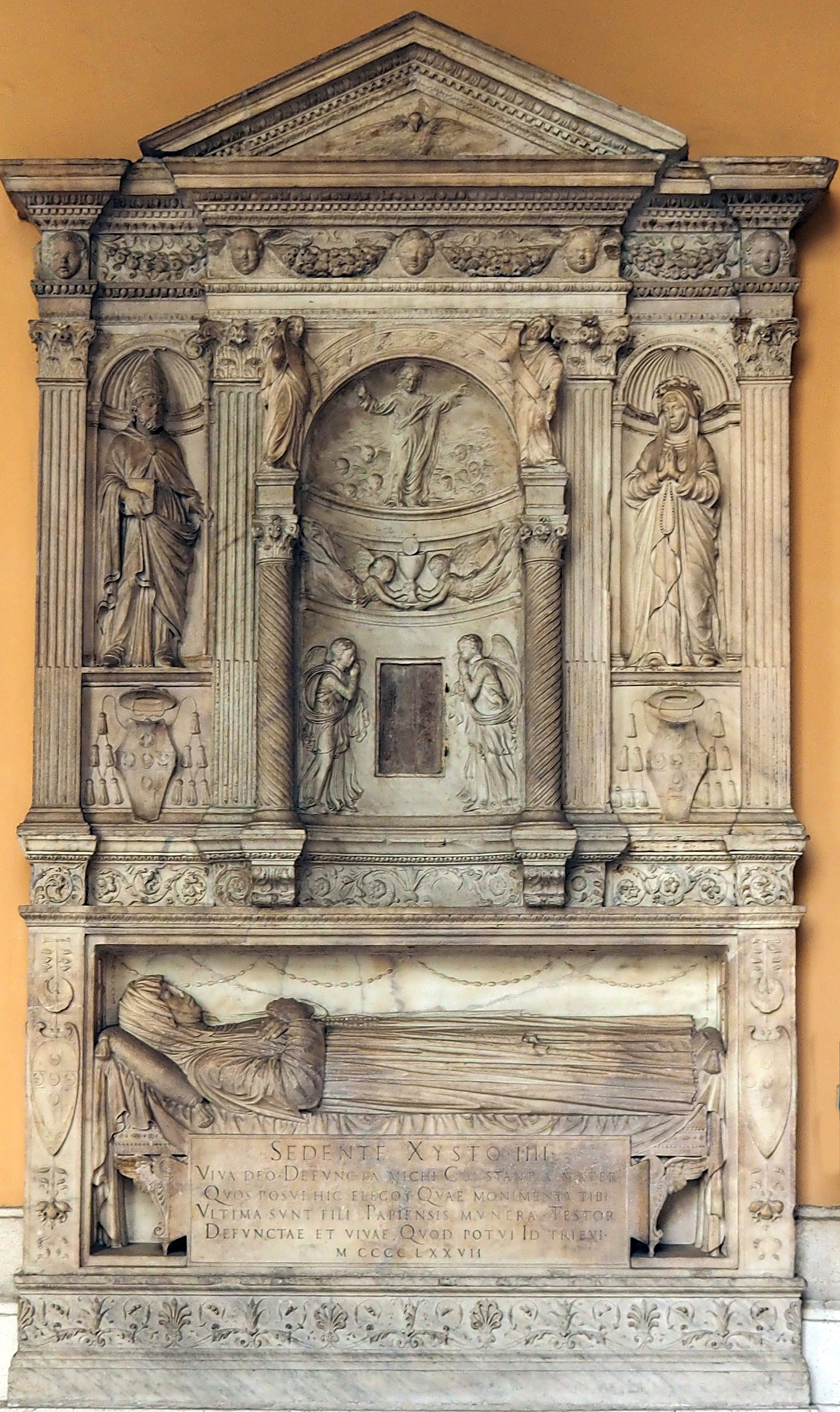 Sant Agostino; Kreuzgang; Grabmonument für Costanza Ammanati; Luigi Capponi